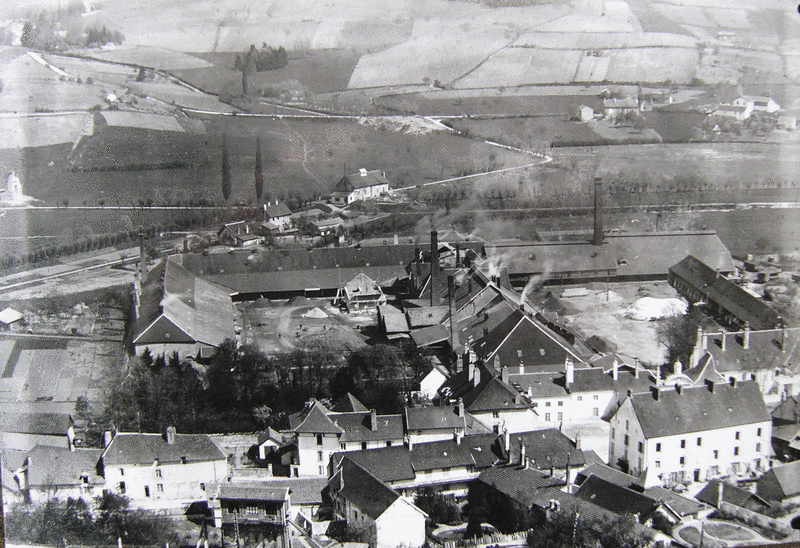 Vue générale de la saline de Montmorot.